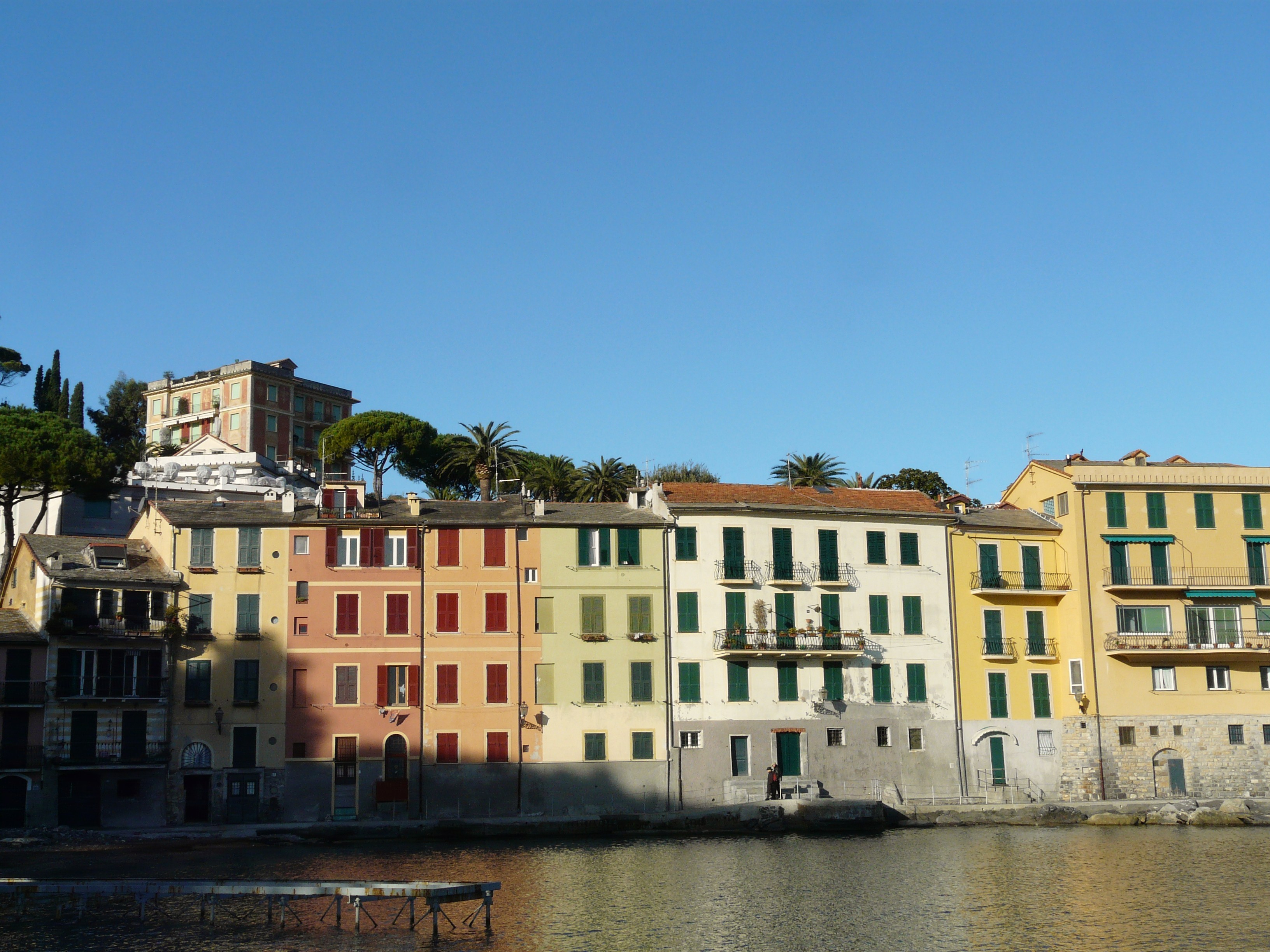 Baia di Trelo, San Michele di Pagana, Rapallo, Liguria, Italia